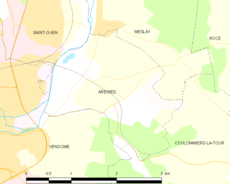 Carte des communes de France, centrée sur Areines (Loir-et-Cher, France, code Insee 41003)